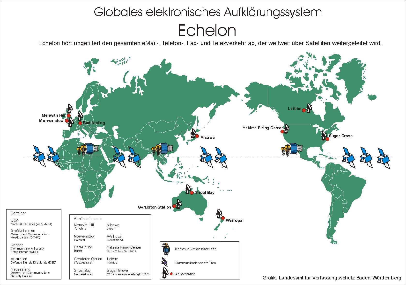 Globales elektronisches Aufklärungssystem Echelon: Echelon hört ungefiltert den gesamten eMail-, Telefon-, Fax- und Telexverkehr ab, der weltweit über Satelliten weitergeleitet wird